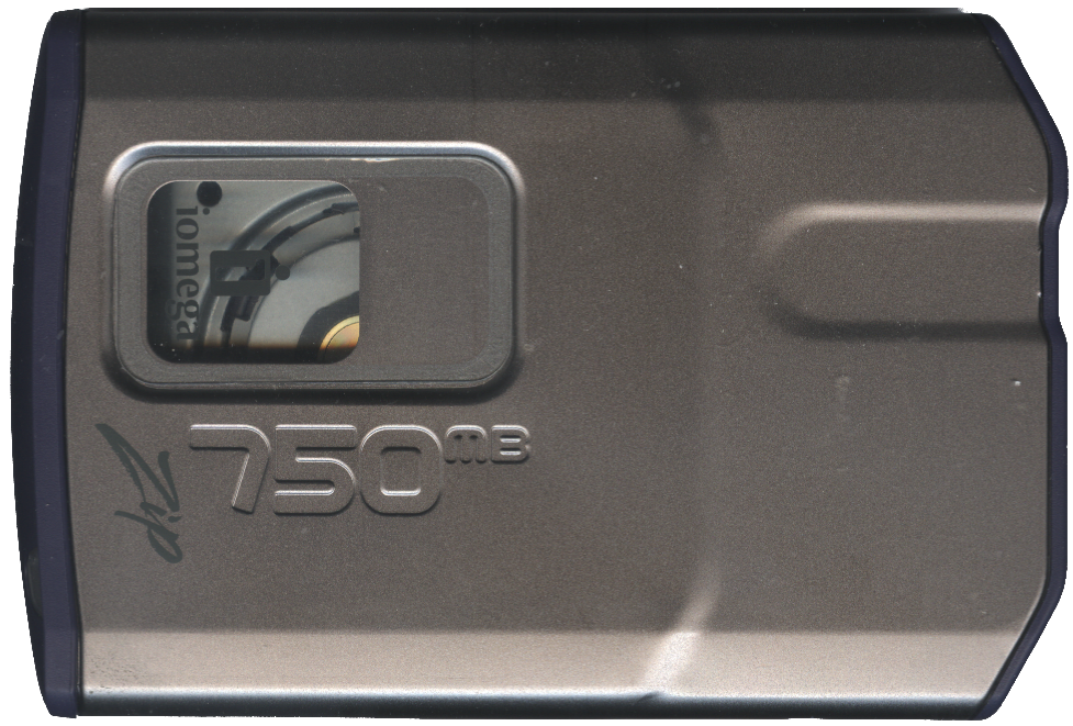 Unidad Iomega Zip 750 USB